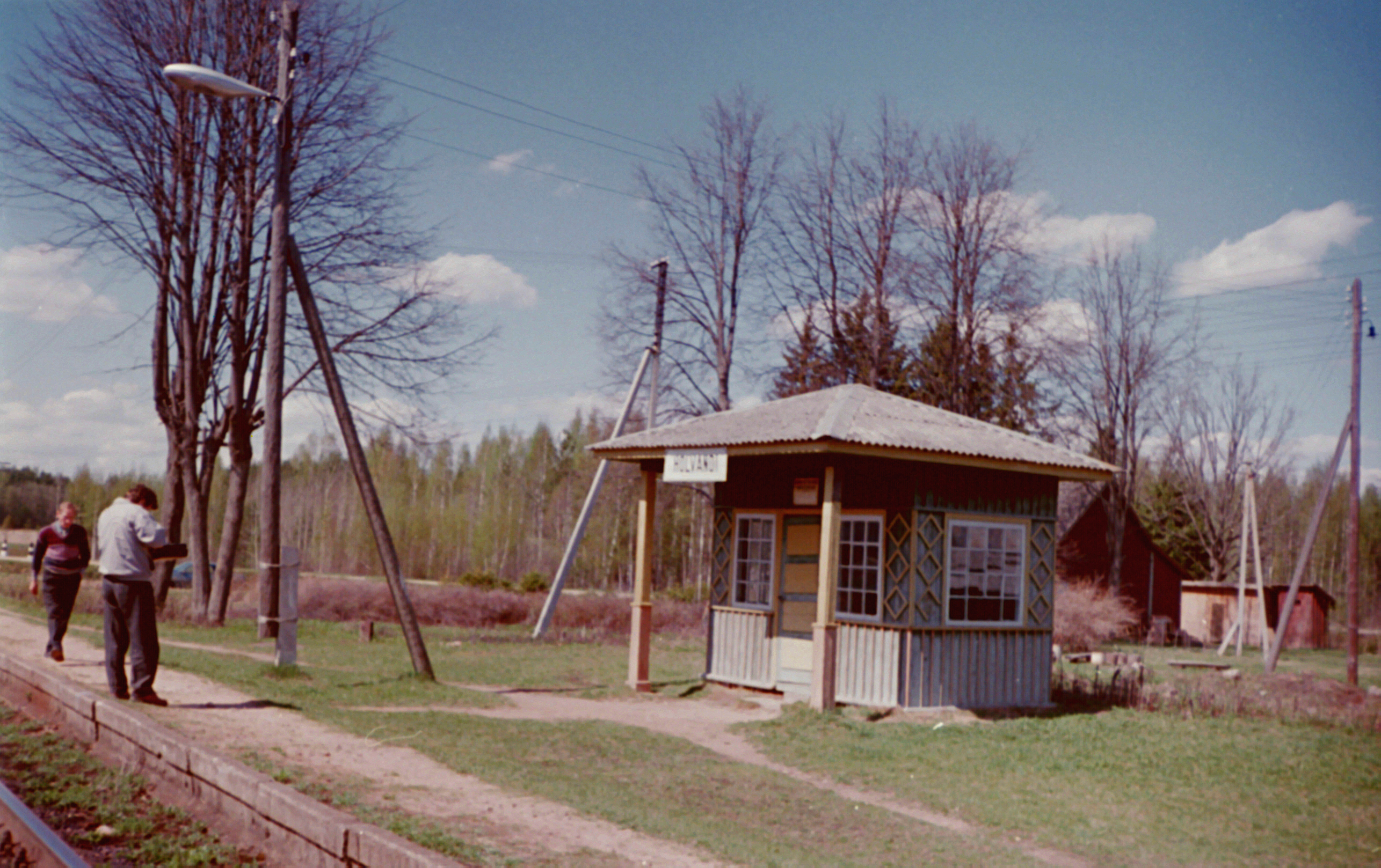 Holvandi raudteepeatus